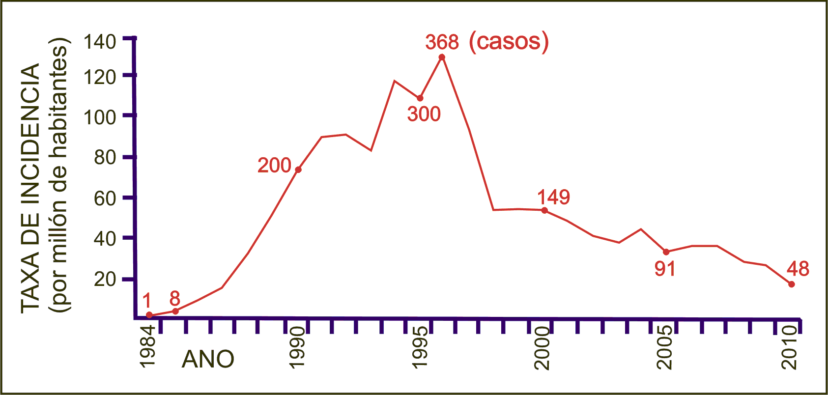 Gráfica de casos de SIda en Galicia. Nas coordenadas a incidencia por millón de habitantes e os anos. Os números vermellos da gráfica son número de casos.